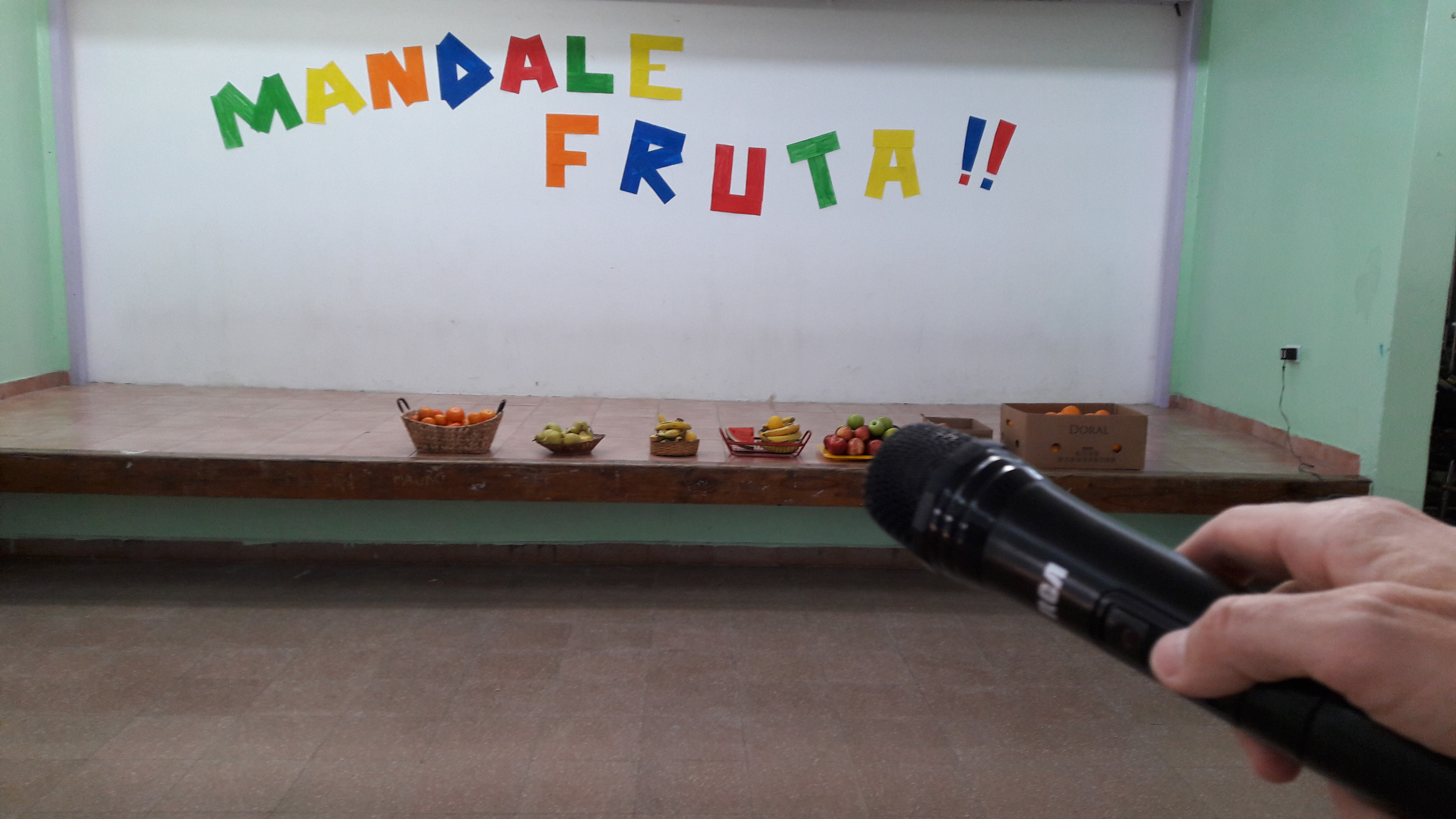 La foto la realicé en una jornada sobre alimentación saludable.